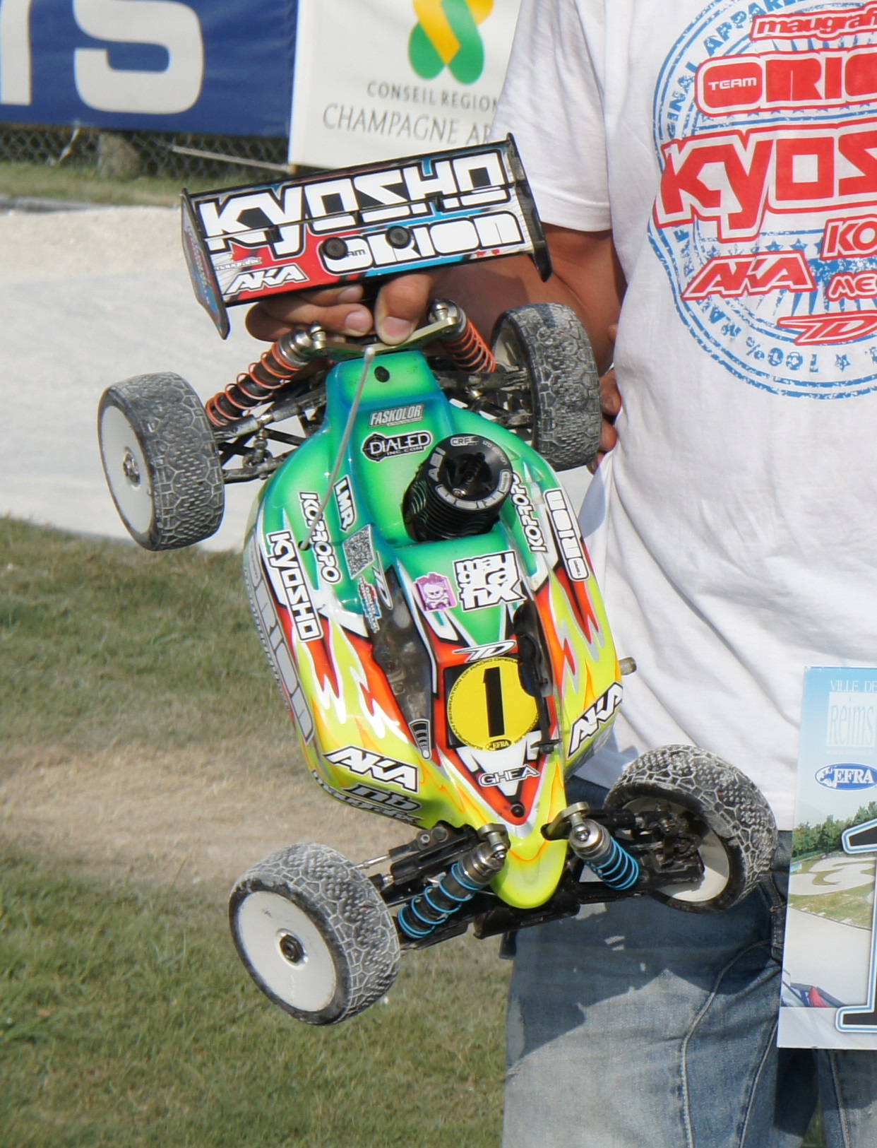 Lors du Championnat d'Europe EFRA de 2013 à Reims .